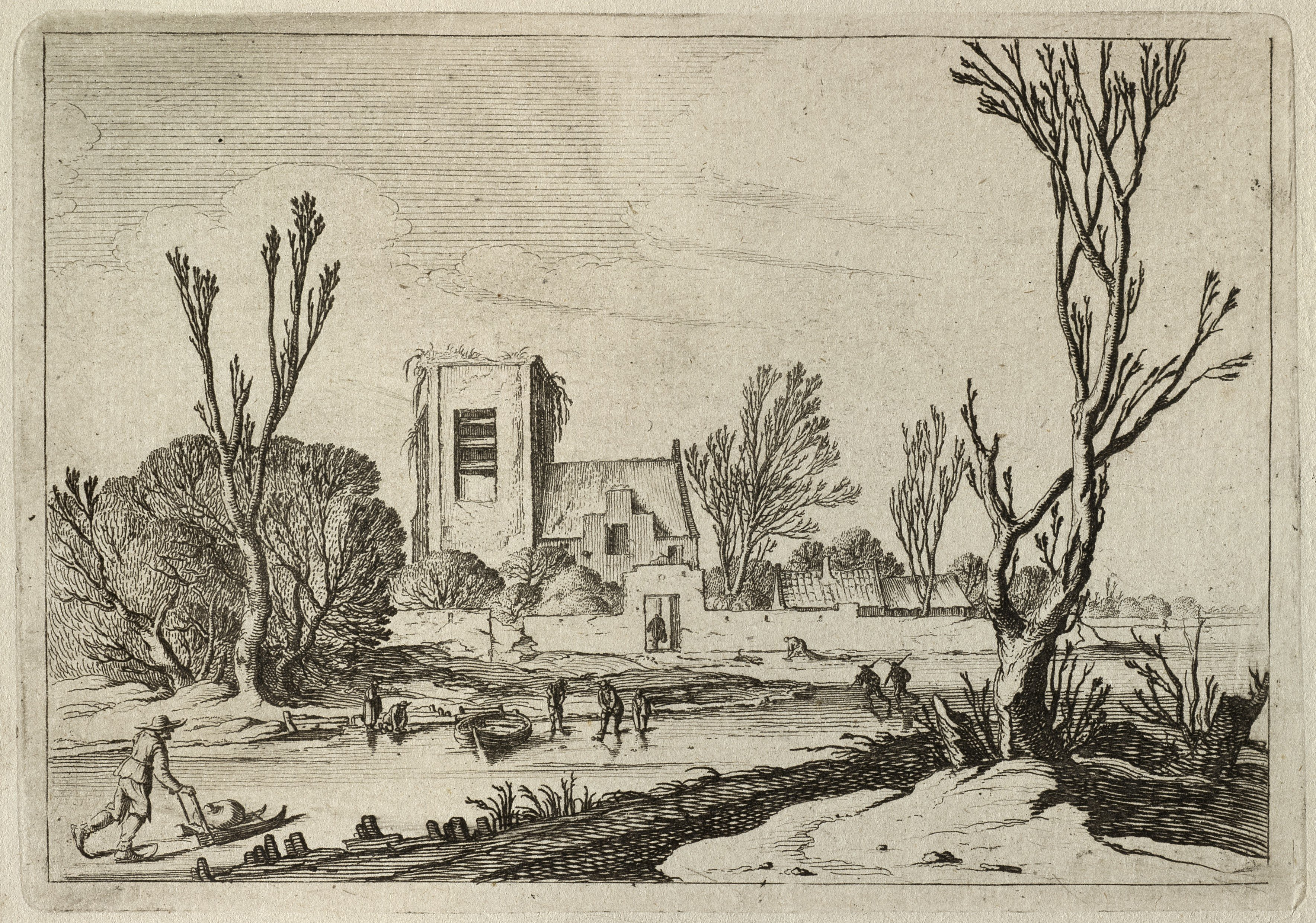 CollectieVoorhelm SchneevoogtInventarisnummerNL-HlmNHA_1477_53011629BeschrijvingWinterlandschap.IJsvermaak op een bevroren rivier. Op de rivier bevinden zich vissers, kolf spelende heren en schaatsers. Verderop ligt een vastgevroren schip. Op de achtergrond een dorp en een kerk zonder dak.Derde prent van een serie van zeven landschappen.Ets.FotonummerNL-HlmNHA_1477_53011629DocumenttypeTopografische prenten, tekeningen en foto'sVervaardigerScheyndel, Gillis van (I) (1594/1596-1653/1660) Begindatum1631Einddatum1656TechniekGrafiek Drukwerk LiteratuurHollstein Dutch, Gillis van Scheyndel, 111